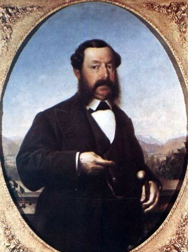 José Tomás de Urmeneta y García (Santiago de Chile, 8 de octubre de 1808 - † Limache, 20 de octubre de 1878) fue un político e industrial chileno. Era de origen vasco.[2] Hombre público y acaudalado industrial, fue dueño de las famosas minas del "Pique de Tamaya", del ferrocarril de Tongoy, en Coquimbo y principal propietario de la Empresa de Gas de Santiago. En Limache trabajó como industrial y agricultor, a la vez que se hizo conocido por su filantropía y ayuda prestada en la formación de San Francisco de Limache.